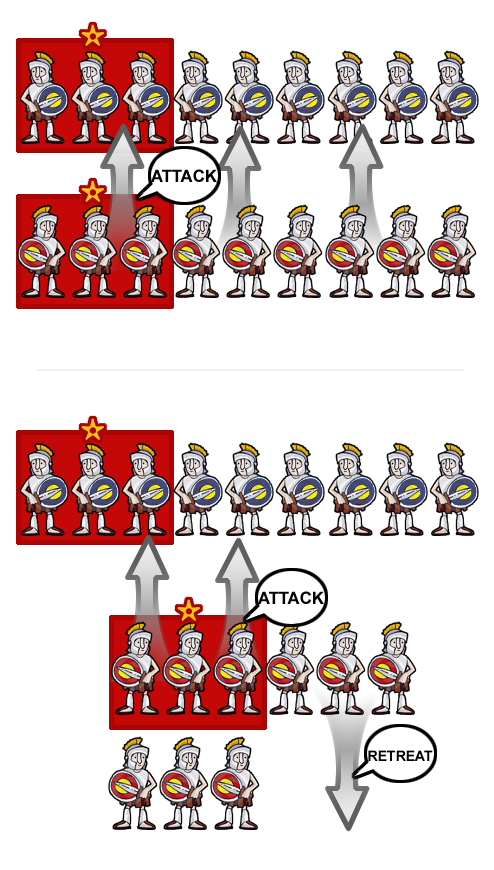 Disposición de los ejércitos en la batalla de Leuctra.